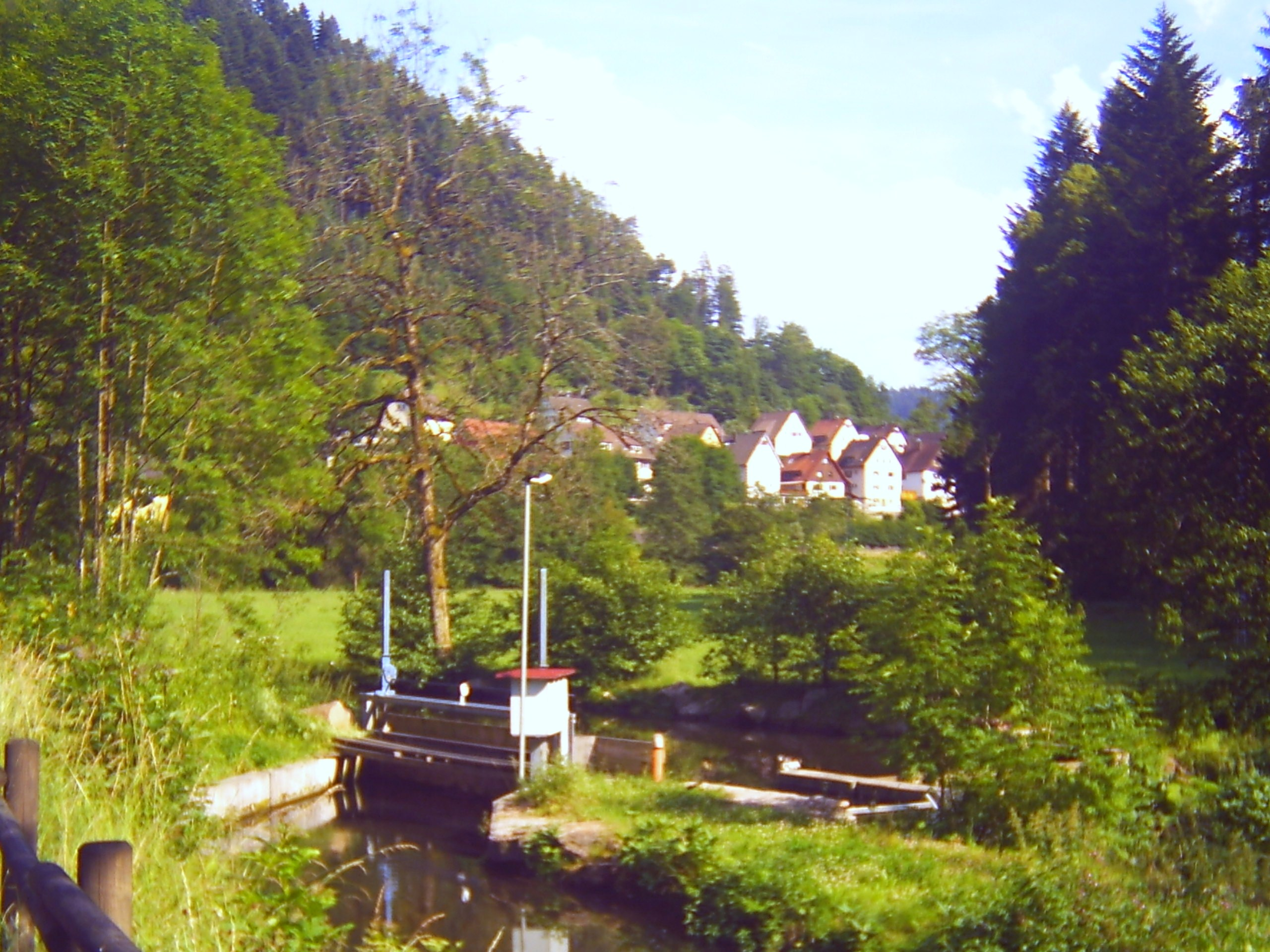 Entrance of Hinterlehengericht (Herdweg)